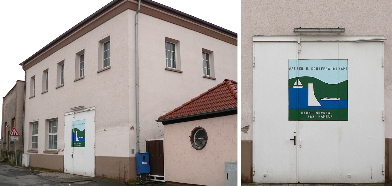 Wasser- und Schifffahrtsamt Außenstelle Hameln